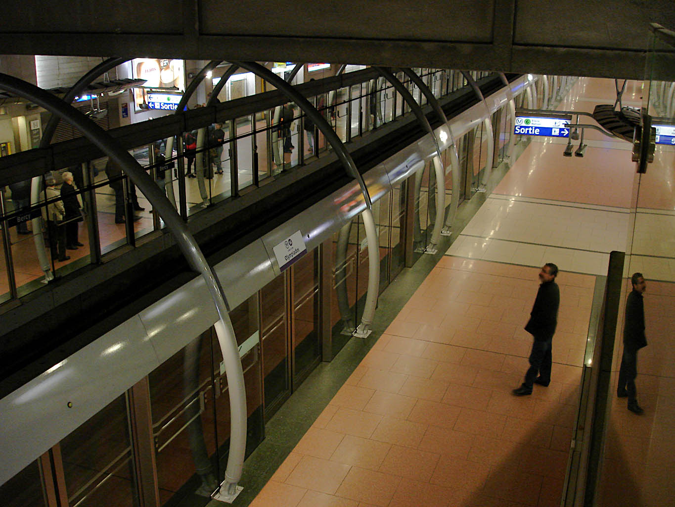 Station Bercy de la ligne 14 du métro de Paris, France.